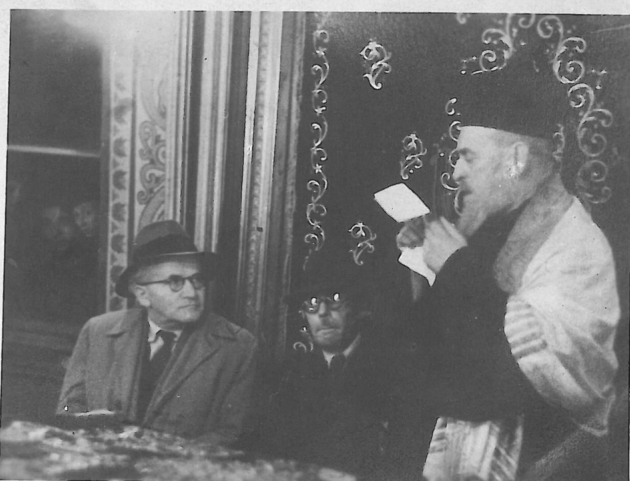 הרב הראשי ליהודי פלובדיב, הרב שמואל בנימין בכר בעת קבלת הפנים לדוד בן גוריון בבית הכנסת שבעיר, בעת ביקורו של בן גוריון בדצמבר 1944